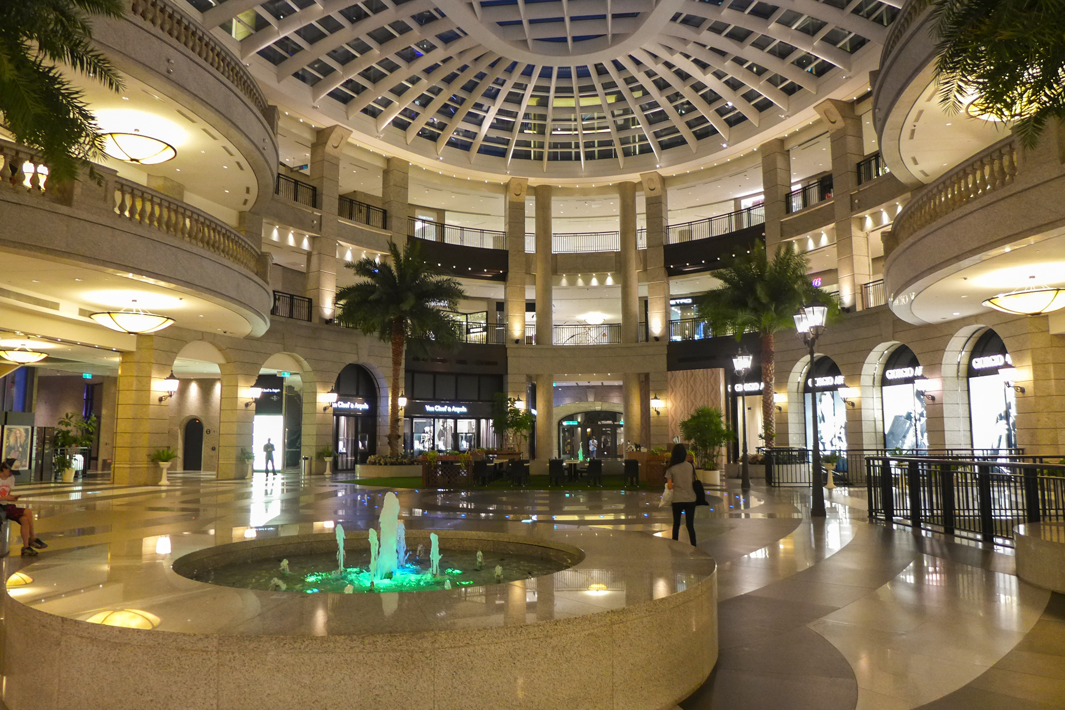 Bellavita